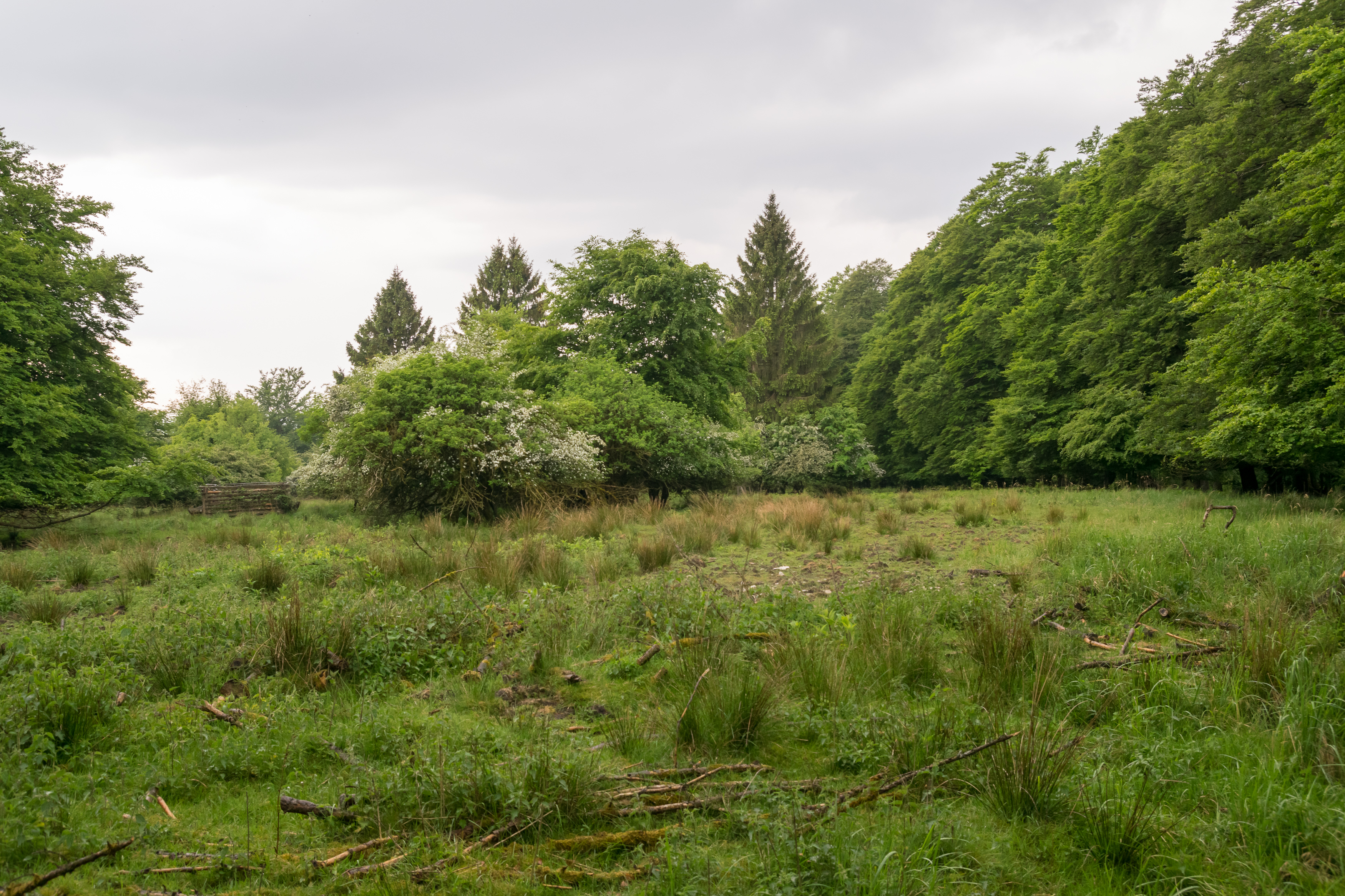 Das Winnfeld ist eine ehemals landwirtschaftliche genutzte Fläche im NSG Östlicher Teutoburger Wald in Detmold, Kreis Lippe